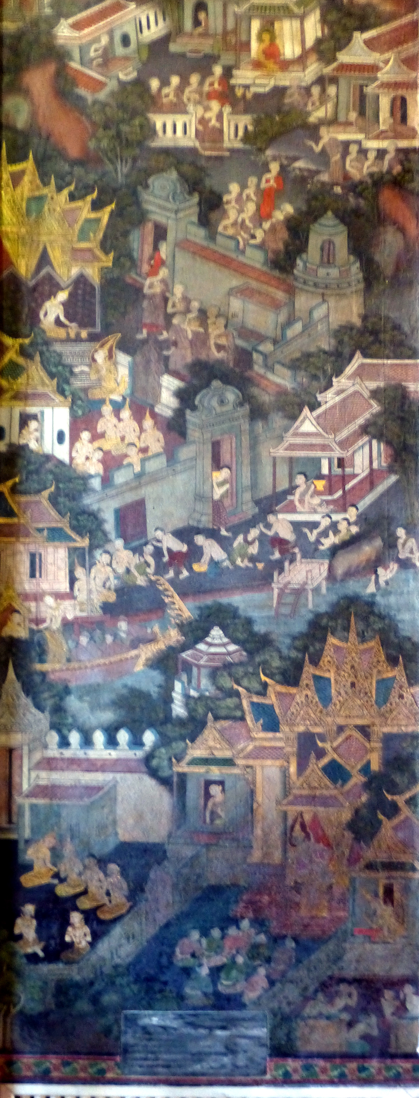 001 Mahapajapati Gotami, Wat Pho by Anandajoti Bhikkhu